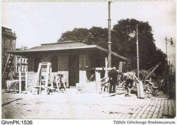 Toilette-byggnaden i Brunnsparken. Nedriven 1914.